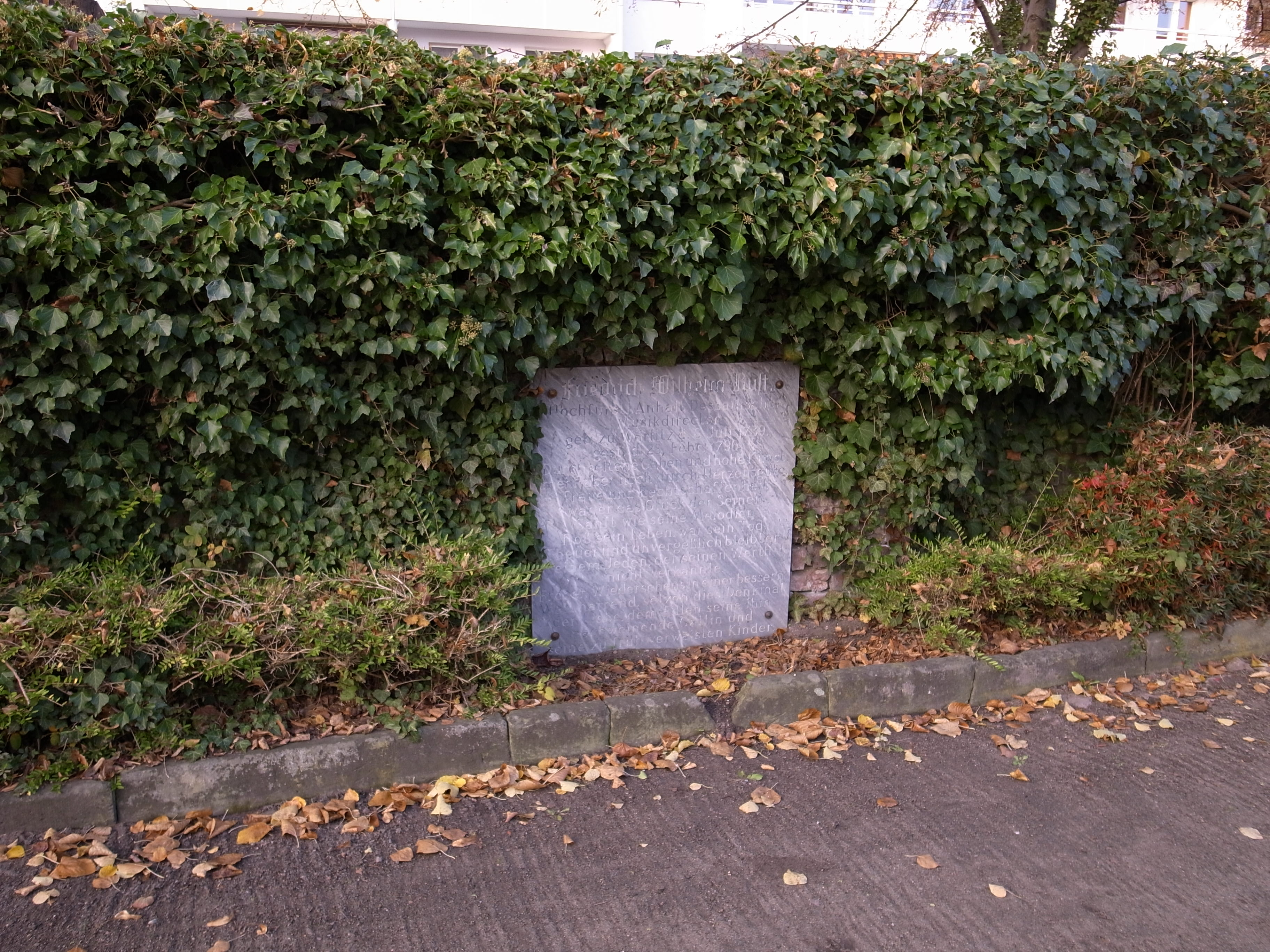 Friedrich Wilhelm Rust, Ruhestätte Neuer Begräbnisplatz (Dessau)